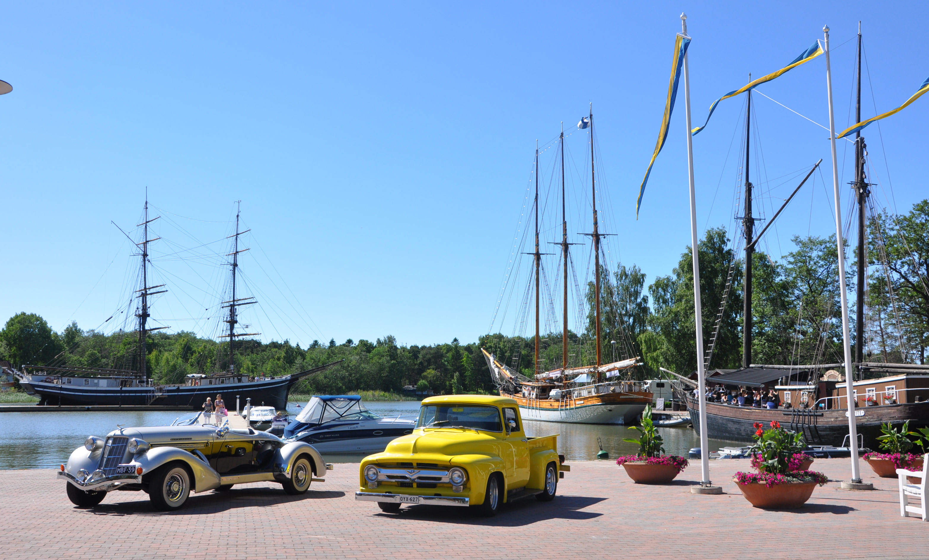 Gerda Poroholman lomakeskuksessa Raumalla